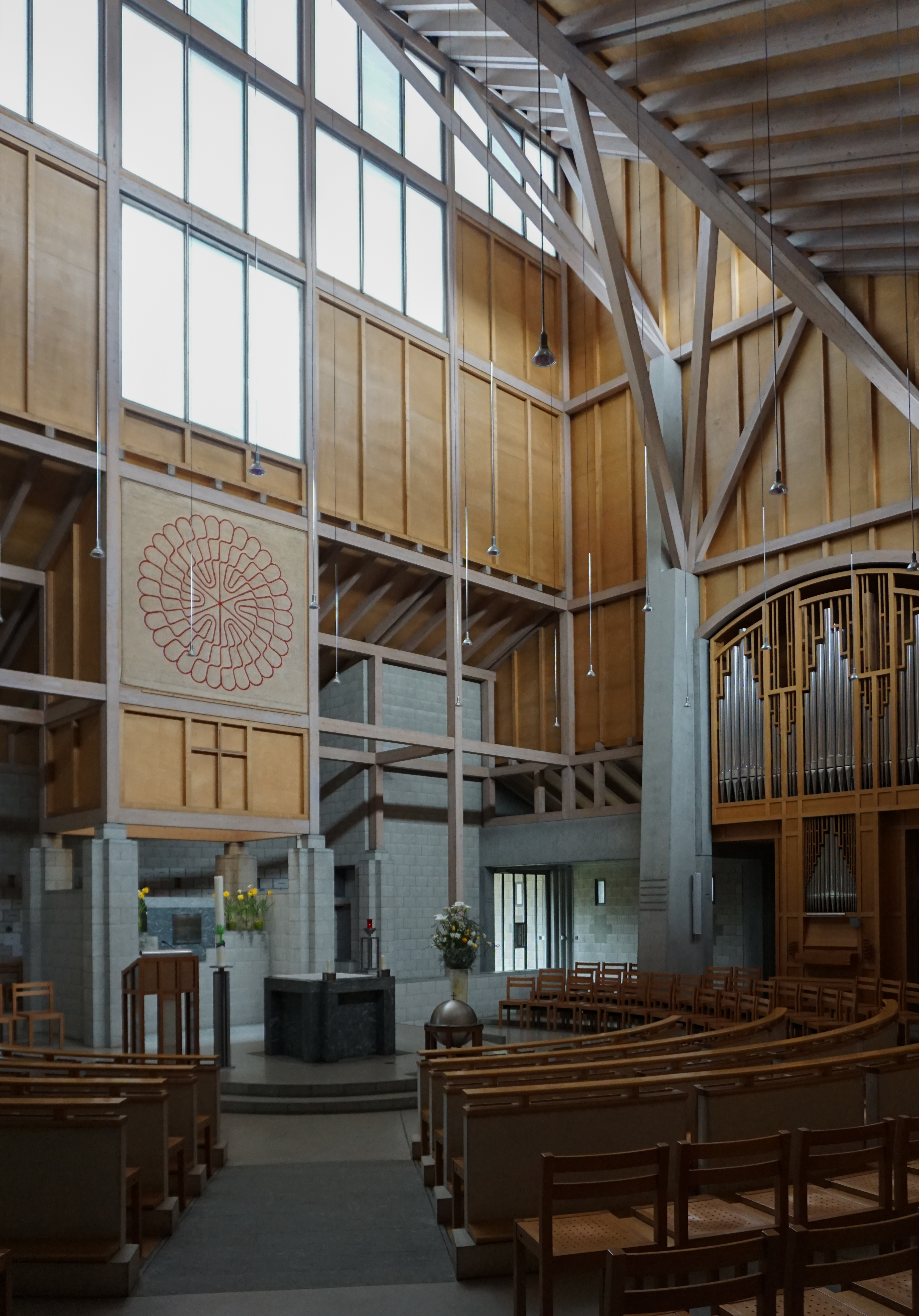 St. Mauritius, Innenansicht diagonal